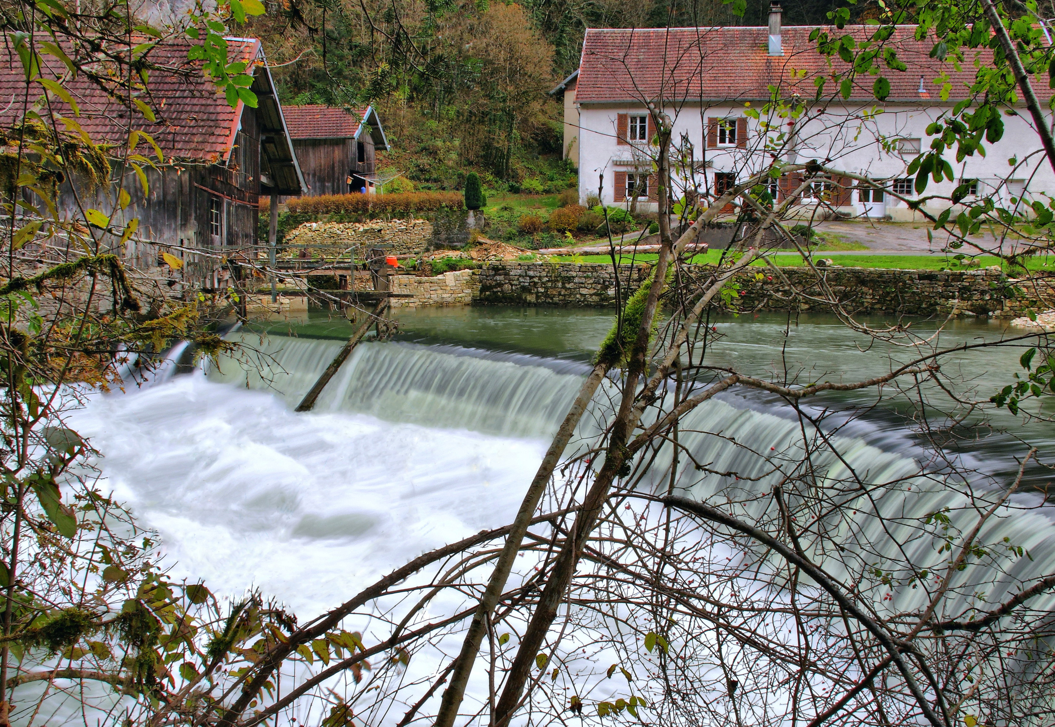 Scierie de Plaimbois-du-Miroir (Inscrit) .